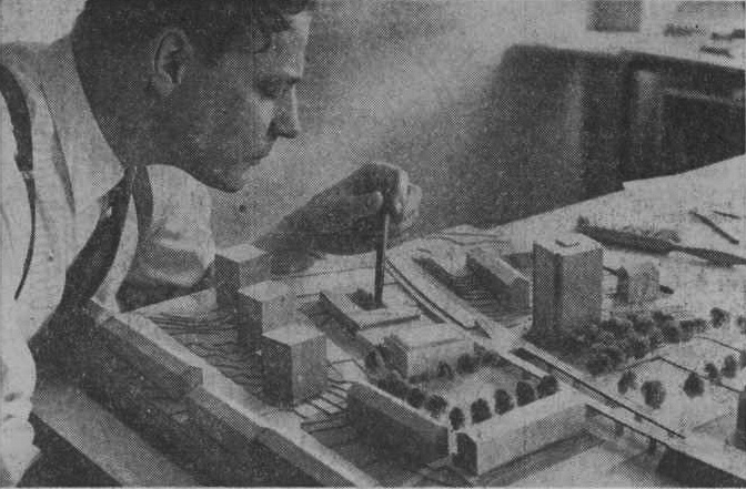 Hjalmar Klemming med modell av Kärrtorpsmedborgarhus